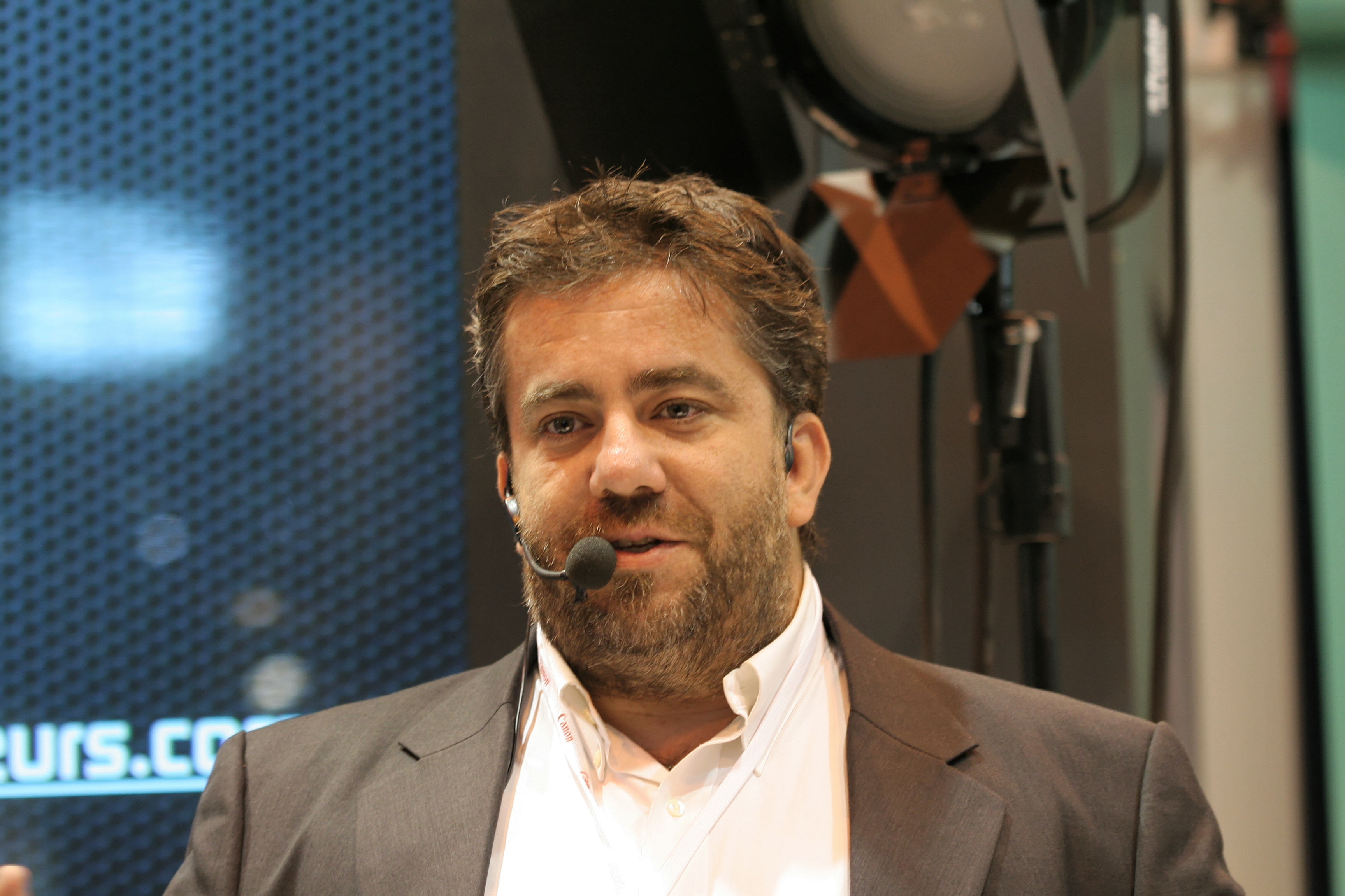 Salon de la photo de Paris 2011, porte de Versailles. Stand Canon, présentation d'Emmanuel Pampuri.